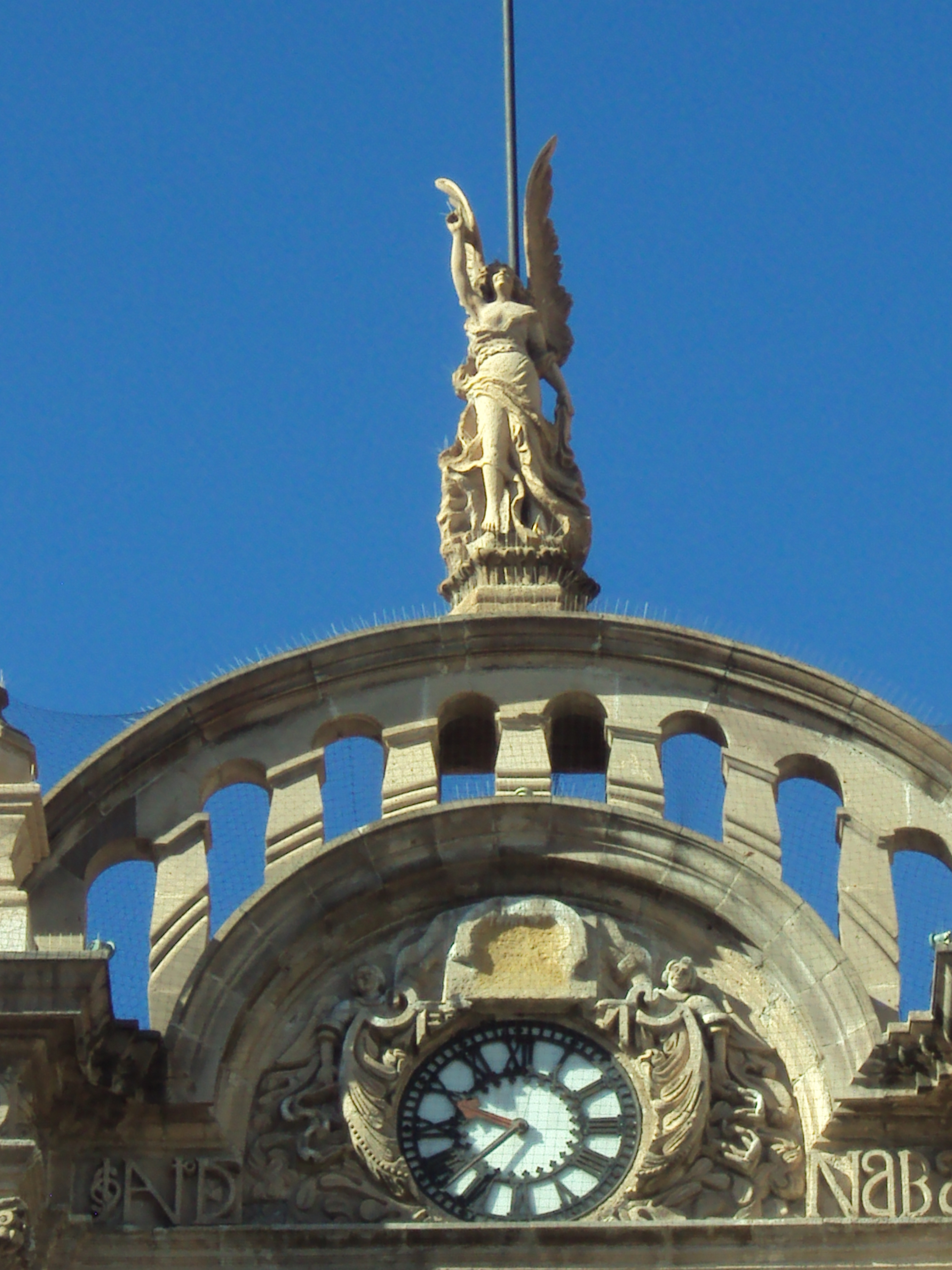 Detalle del arcángel que corona la facha de la Catedral de Chihuahua, bajo el y sobre el reloj, la antigua corona real de España fue destruida tras la independencia de México